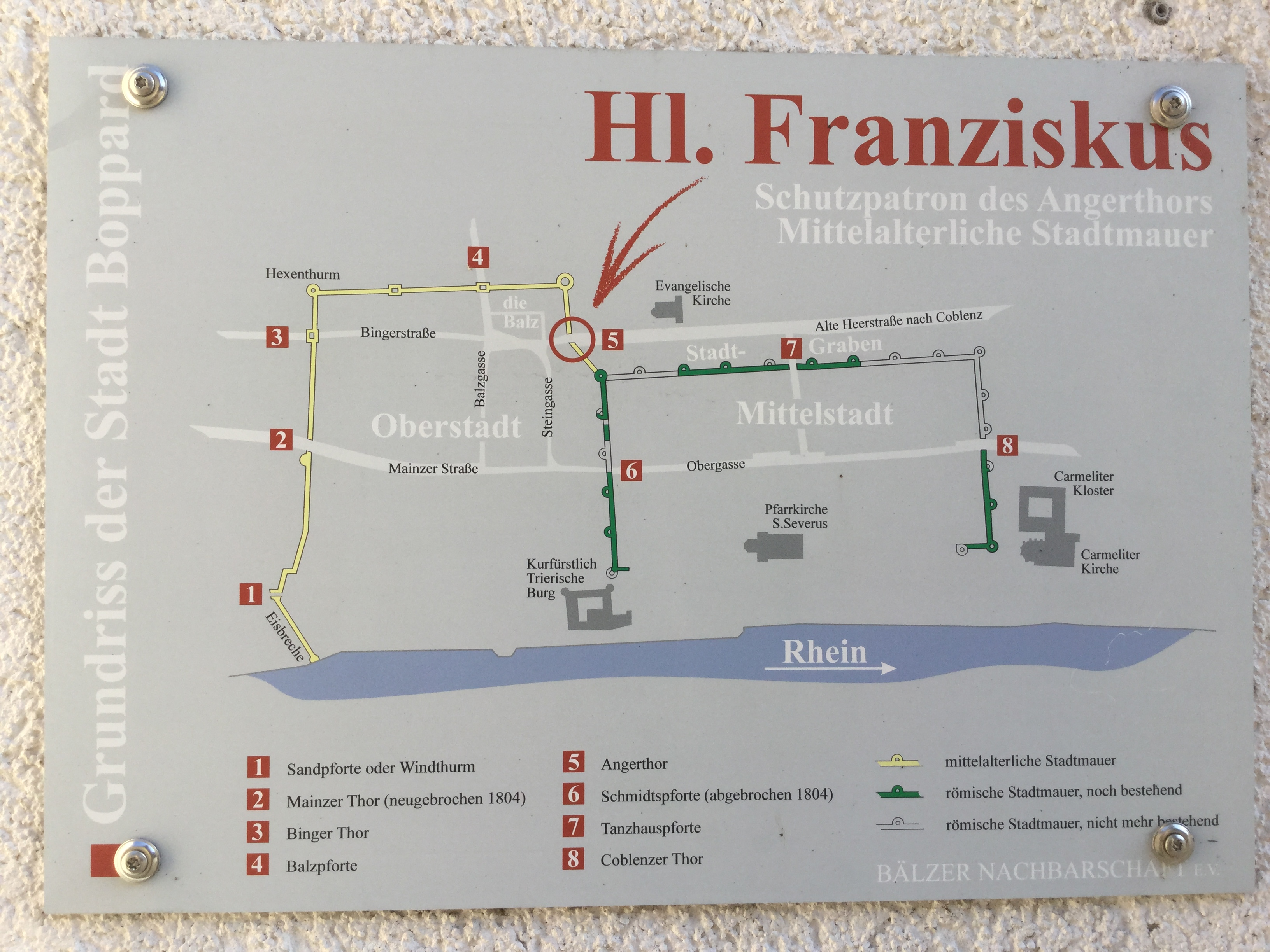 Grundriss Boppbard Stadtmauer", Angertstraße 3, vgl. Grundriss Boppbard Stadtmauer Fundort.JPG